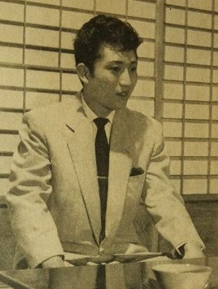 柴田修（ジャズシンガー、五代目哥沢芝金）